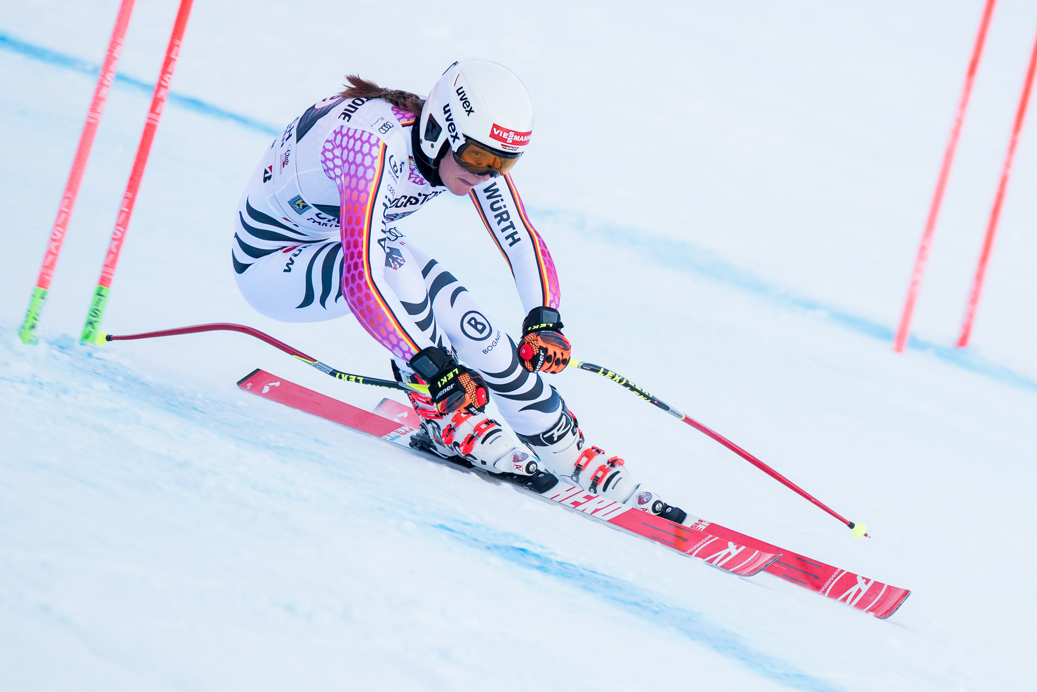 64. Kandahar Rennen,Audi FIS Ski Weltcup Garmisch-Partenkirchen,Damen Abfahrt,Kandahar,Ladies Downhill,Meike Pfister